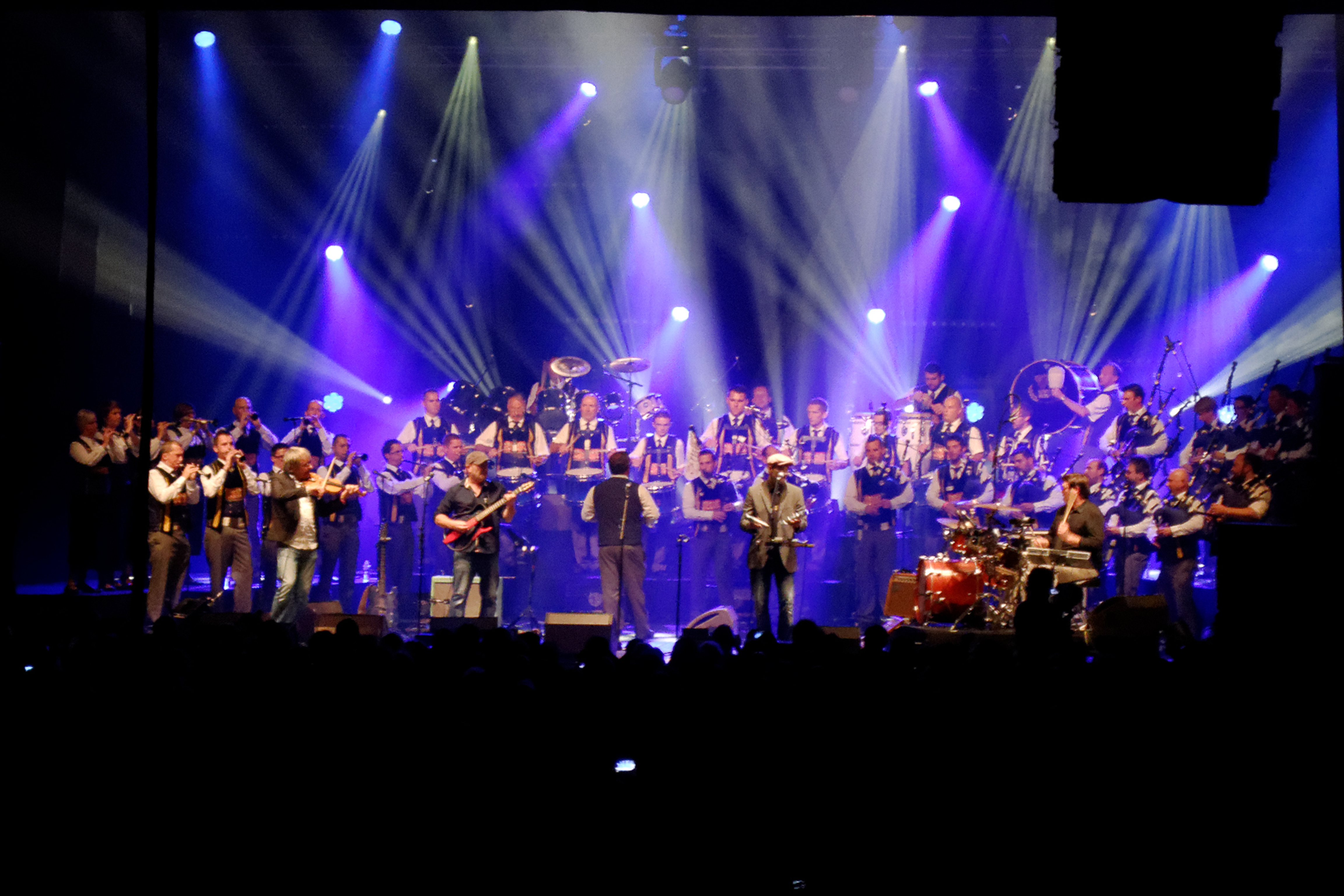 Le spectacle Fest-Rock avec Red Cardell et Bagad Kemper au Festival Interceltique de Lorient, le 8 août 2014.